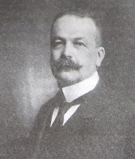 Josef Karel Hrubý z Jelení, český šlechtic a politik